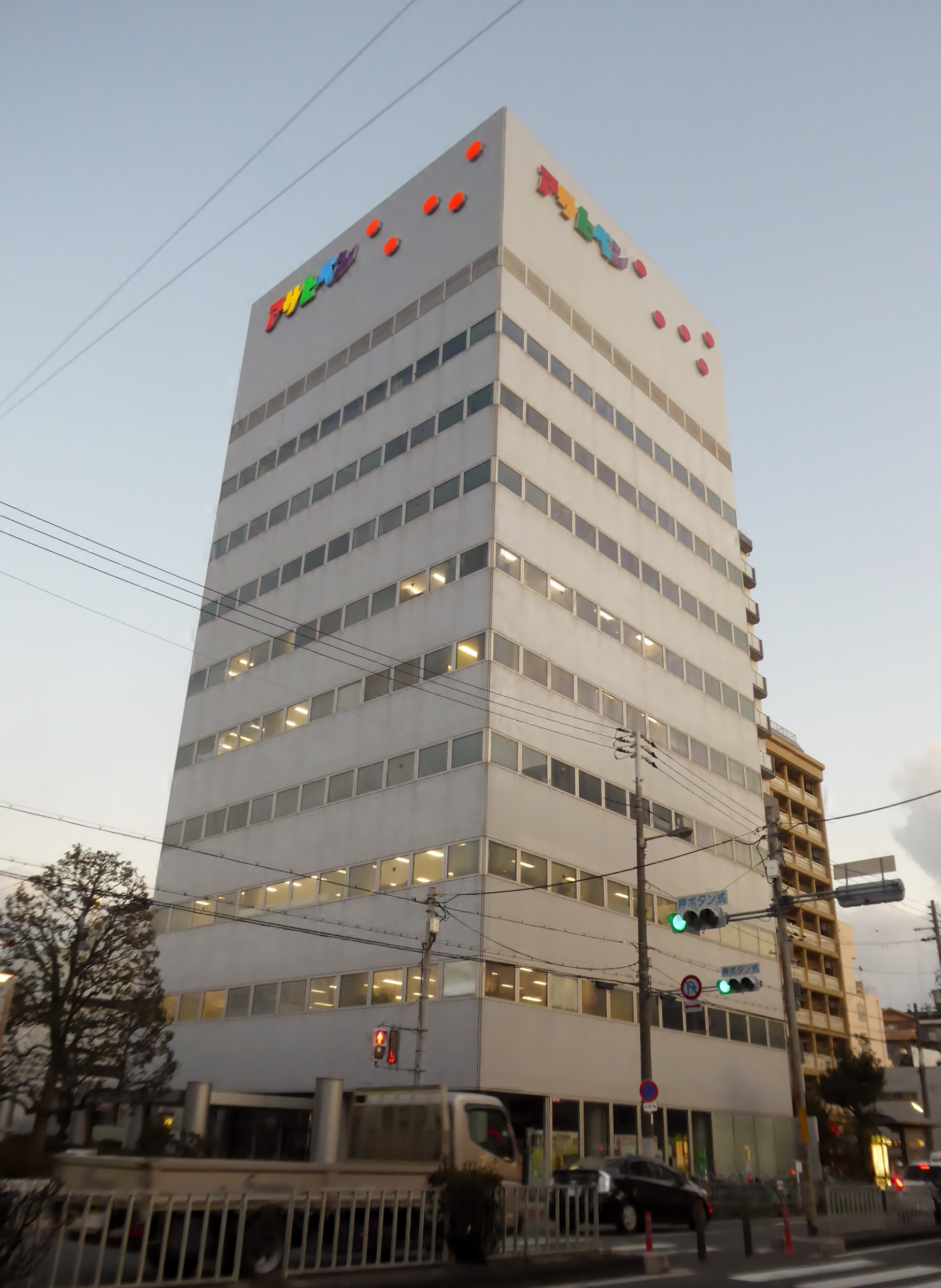 株式会社アサヒペン本社を撮影。 Panasonic Lumix DMC-TZ60